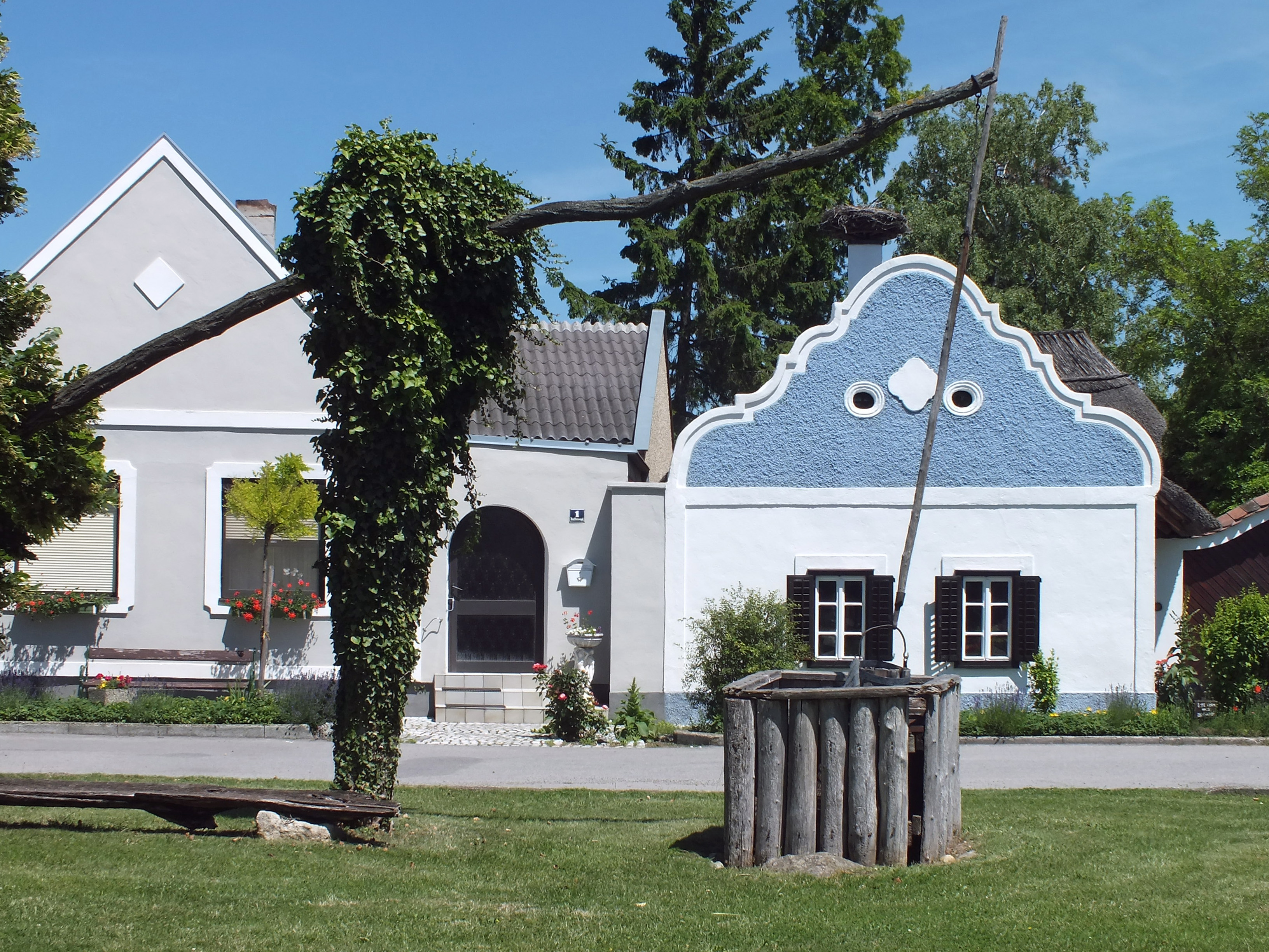 Typische Dorfansicht in Apleton